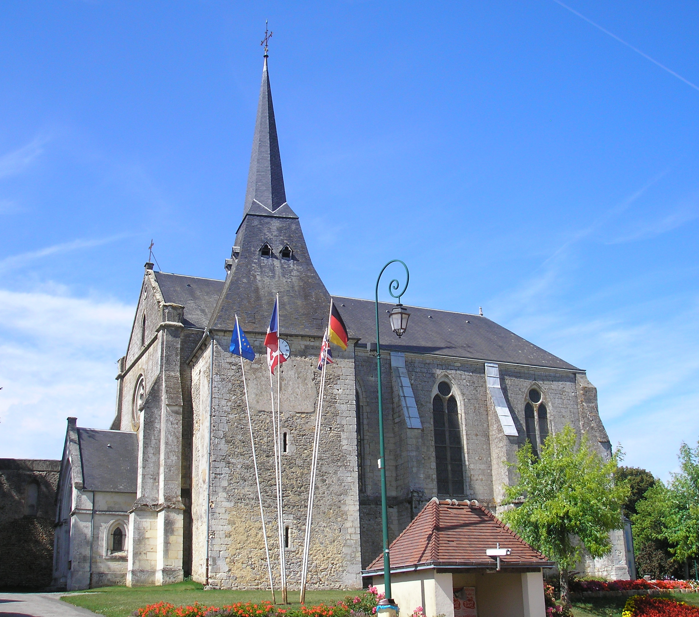 Saint-Martin-du-Vieux-Bellême (Normandie, France). L'église Saint-Martin.